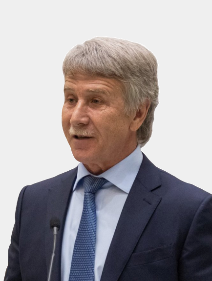 Леонид Викторович Михельсон (род.1955) — российский предприниматель